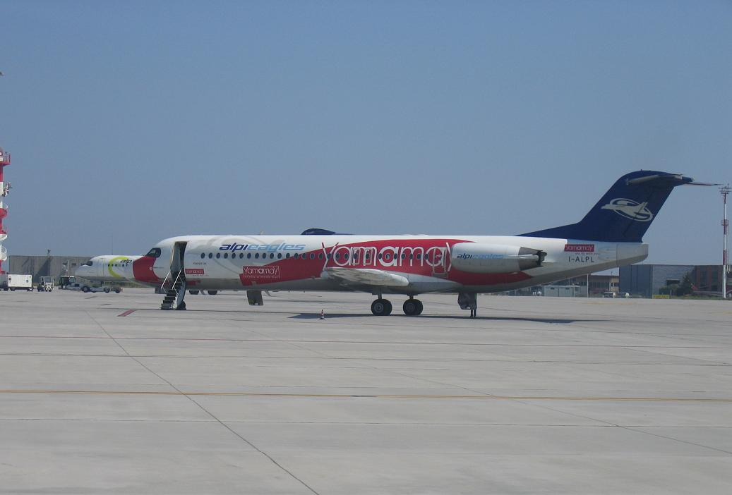 Foto scattata da me, Venice Airport, Estate 2006, AEREO AlpiEagles (I-ALPL) _ Fokker100. Licensing Alpi Eagles